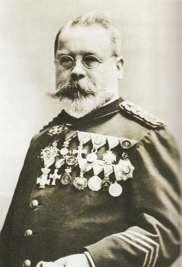 Reginald Czermak(1846-1929)Gründer des ÖBFV in Österreich